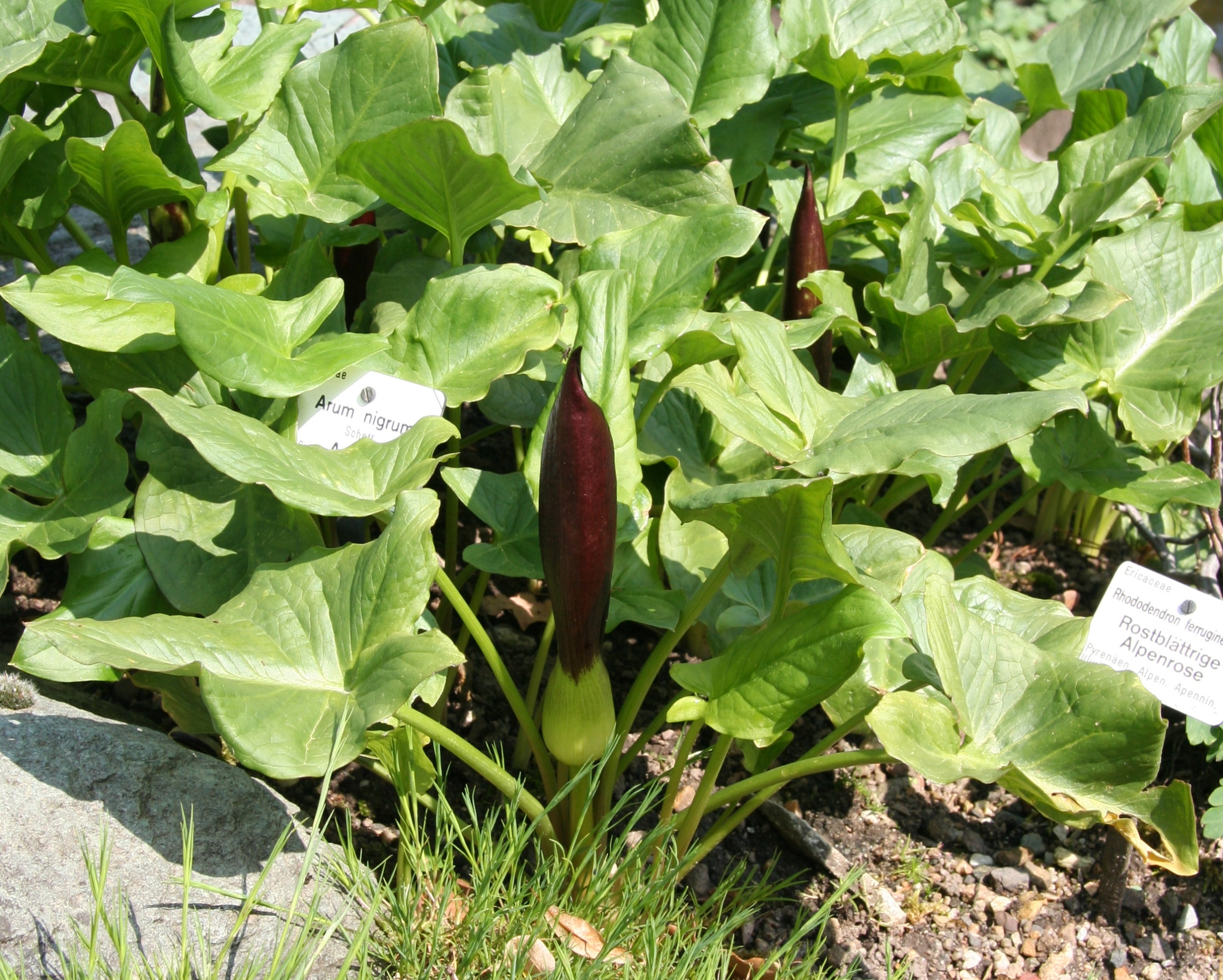 Arum nigrum im Botanischen Garten Dresden